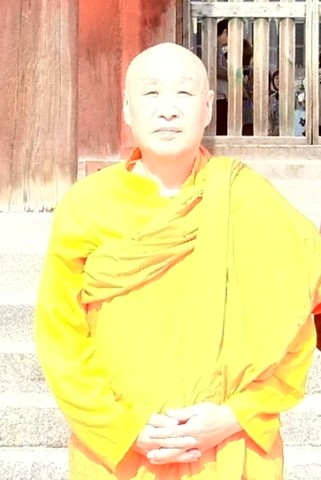 Bodhi Pannya Gunika Bhikkhu